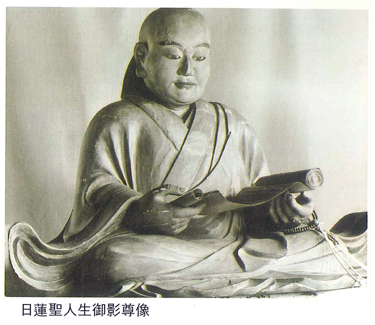 日蓮聖人とお弟子たちの歴史を訪ねて─日蓮宗本山めぐり─（日蓮宗新聞社）